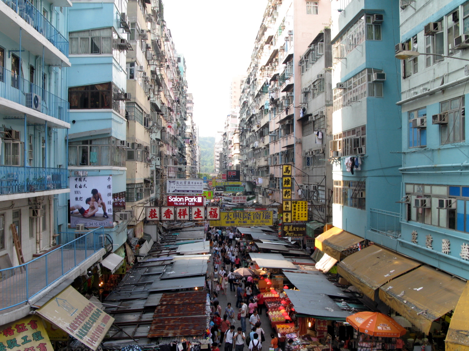 香港九龍zh:花園街 HK Kowloon Ya Fuen Street